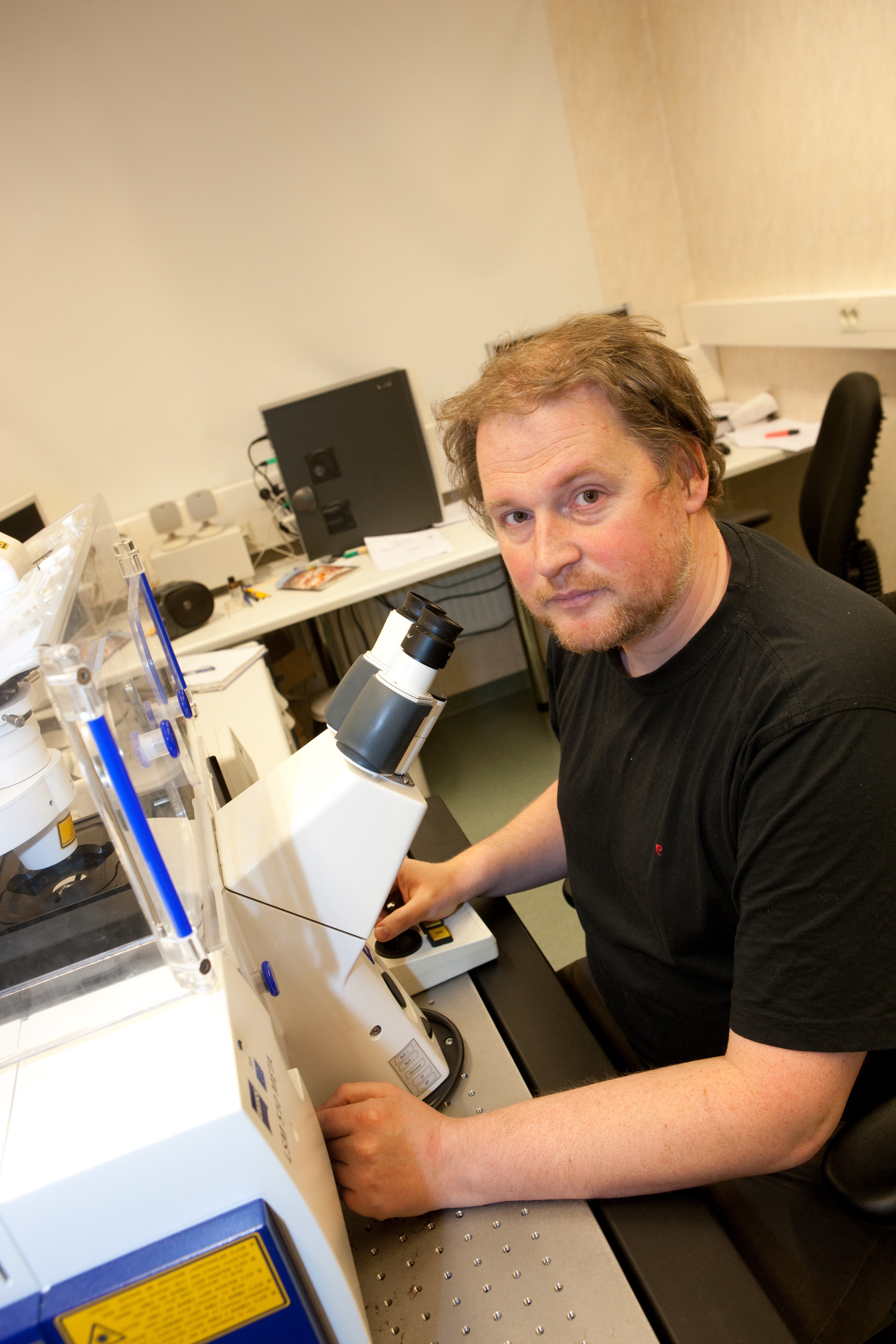 Tartu Ülikooli farmakoloogia instituudi molekulaarse toksikoloogia professor Allen Kaasik.